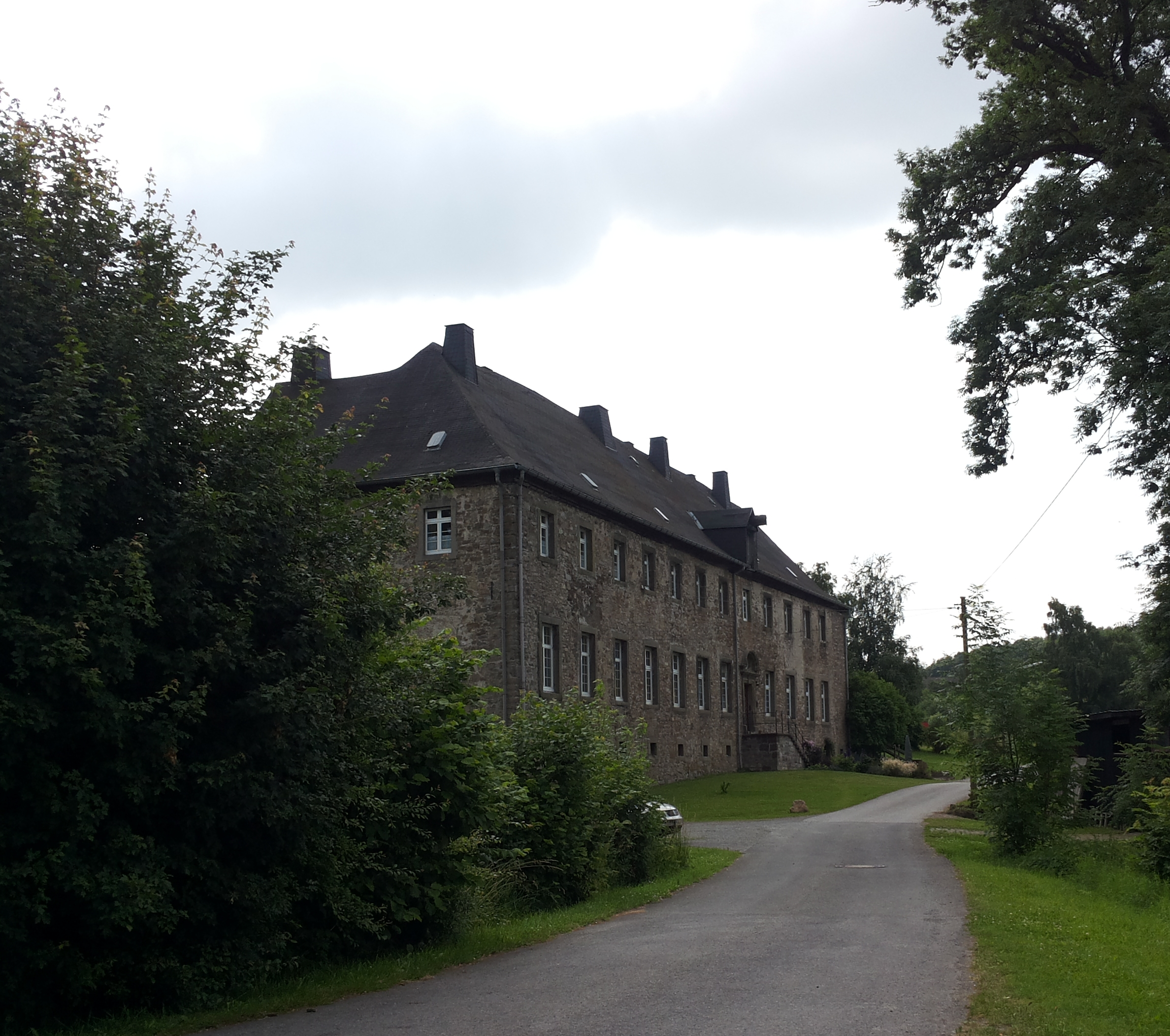 Ehemaliges Kloster Galiläa in Meschede